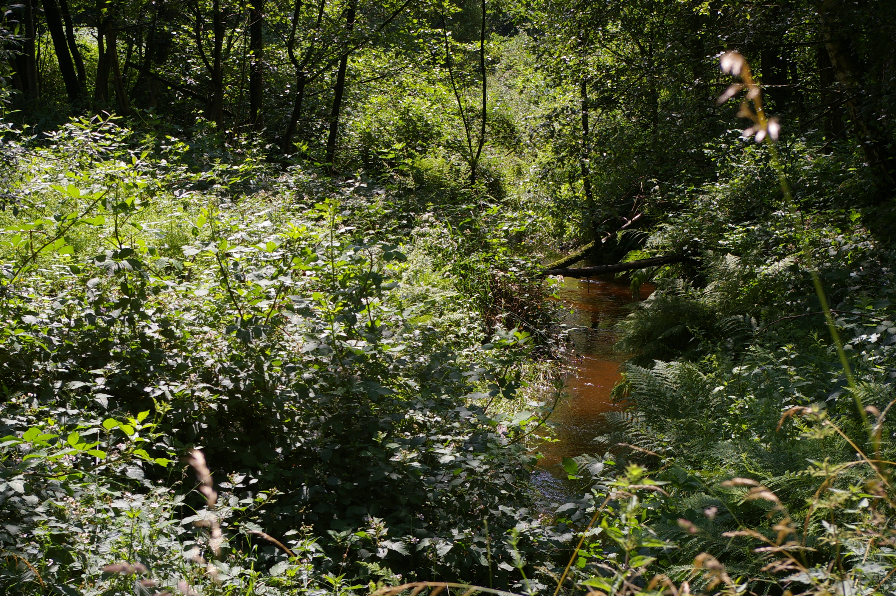 Der namensgebende Bach (Speckenbach) im NSG Speckenbachtal